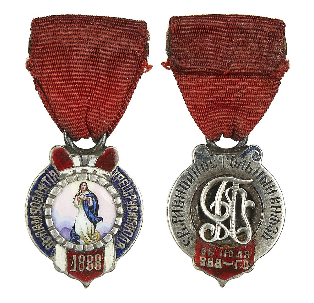 Жетон “В память 900-летия крещения Руси. 988-1888 гг”. Неизвестная мастерская, Россия, 1890-е гг. Серебро, эмаль, живописная эмаль. Вес 8,72 гр. Размер 32х22 мм. Состояние VF-XF(старая реставрация ушка). На старинной ленте.